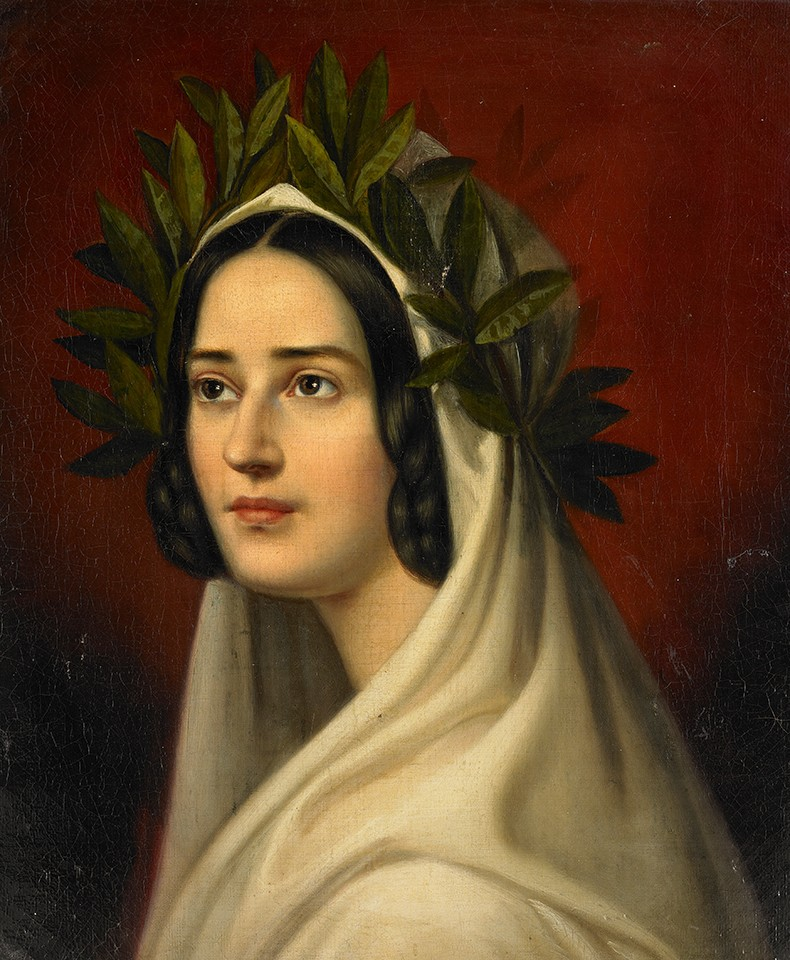 Maximiliane von Arnim, spätere Gräfin von Oriola